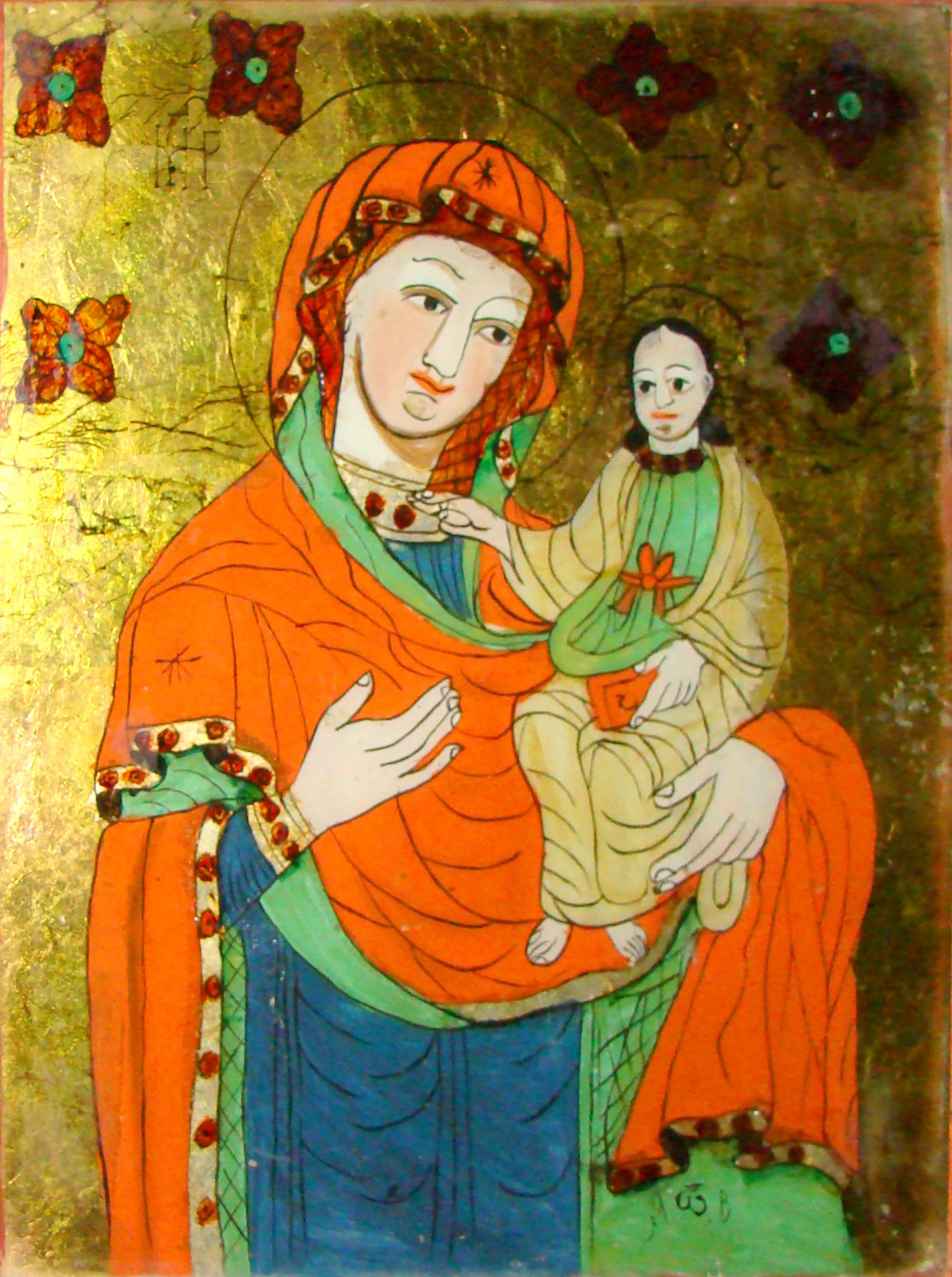 Biserica de lemn „Sf.Arhangheli” din Boiereni, județul Maramureș